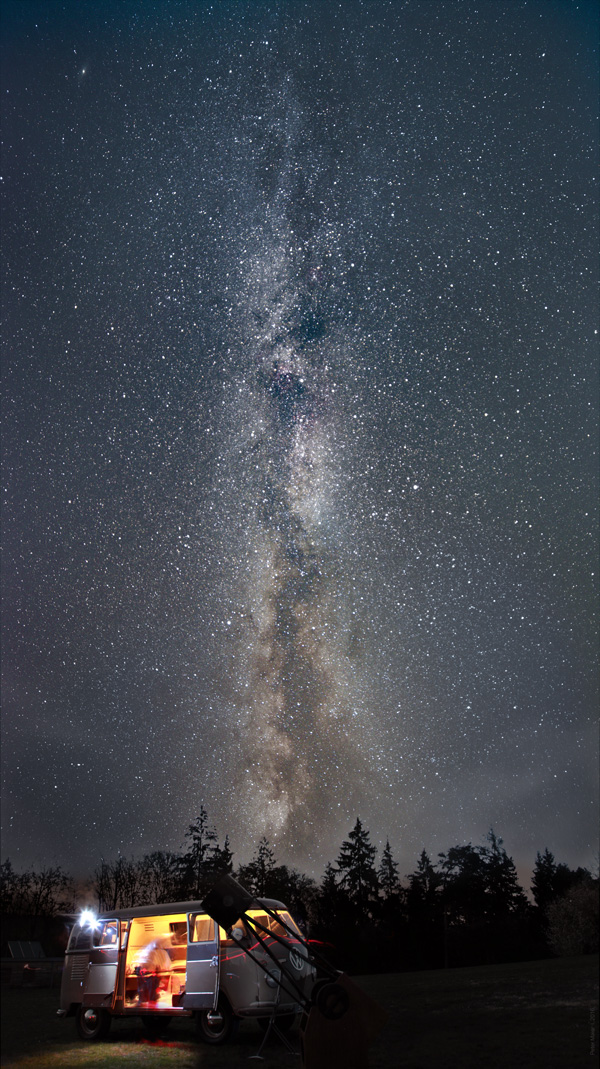 Langzeitbelichtung der Milchstraße über dem Osterberg bei Pfünz im Naturpark Altmühltal (Oberbayern, Landkreis Eichstätt, Gemeinde Walting), Aufnahme: Peter Maier, Ausrüstung: Canon EOS 5D MII, 12x1,4Min Belichtungen, nachgeführt mit Vixen Polarie Startracker